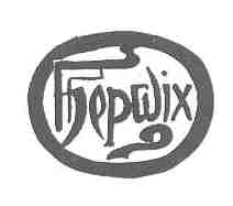 Logo der von Cecil Hepworth gegründeten Hepworth Manufacturing Company